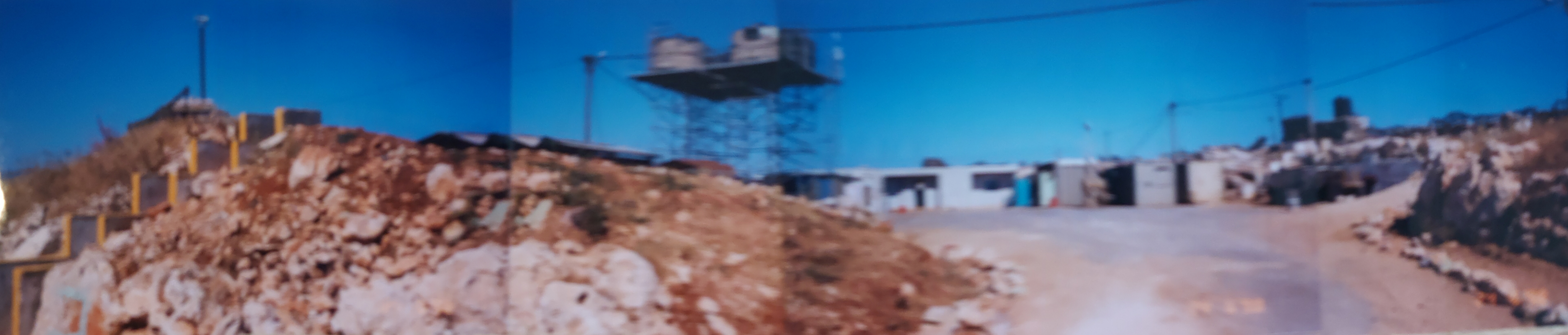 תמונה שצילמתי ביוני 1998